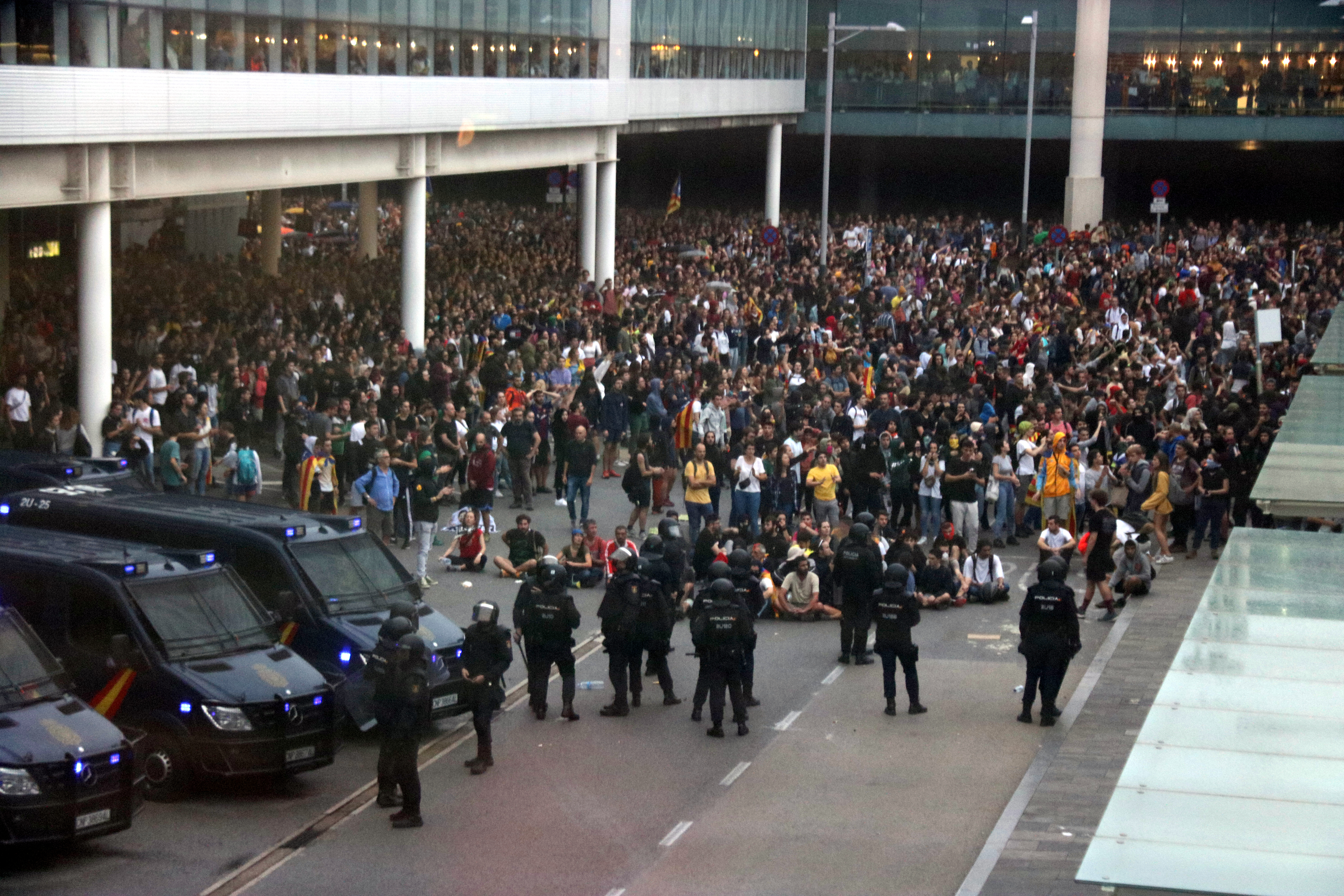 Manifestants a la T1 de l'Aeroport del Prat el dilluns 14 d'octubre del 2019.